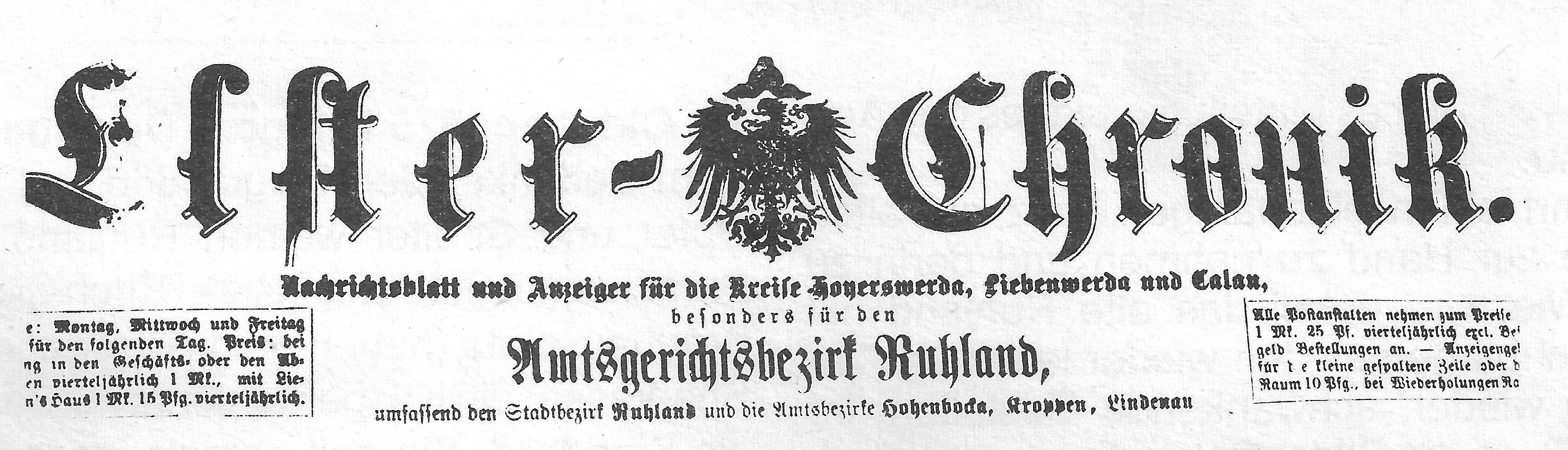 Titel der ersten Oktober-Ausgabe 1875 der regionale Zeitung „Elster-Chronik“, die zuerst als „Schlesisch-Sächsischer Anzeiger, Blatt für Unterhaltung und Geschäftsverkehr, ..., besonders der Orte, Ruhland, Ortrand, Mückenberg, Bockwitz, Lauchhammer und Umgegend“ erschien